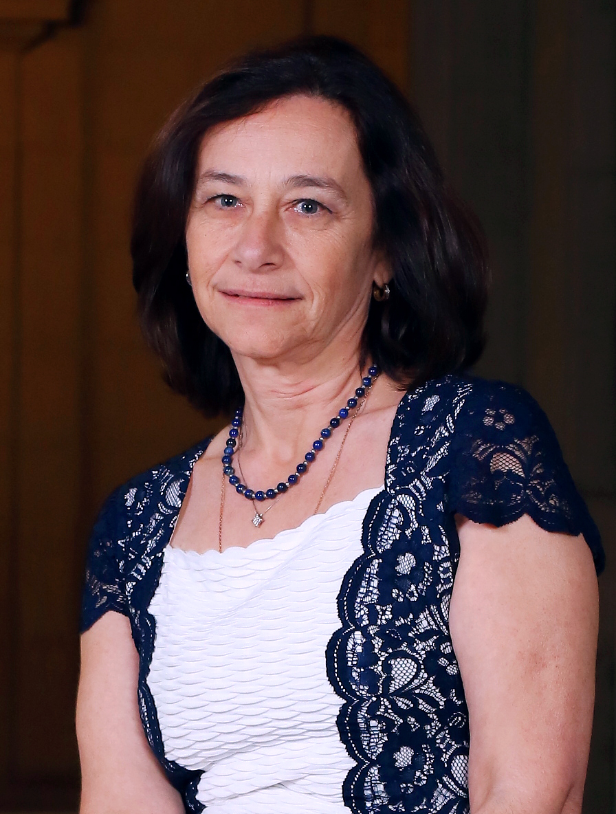 Consejera del Banco Central de Chile, Rosanna Costa